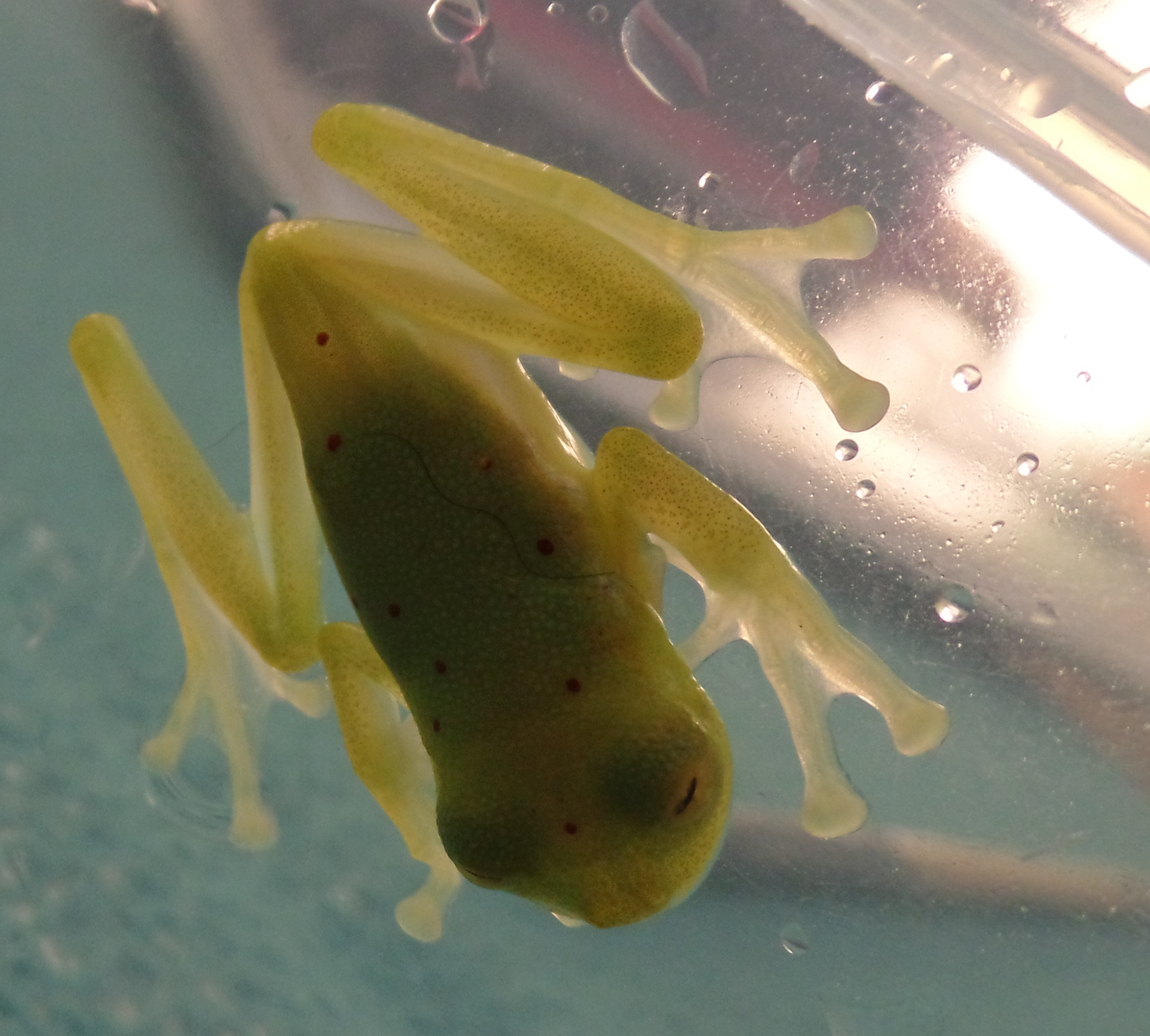 foto tomada en el municipio de Santa Rosa de Cabal, Risaralda, Colombia